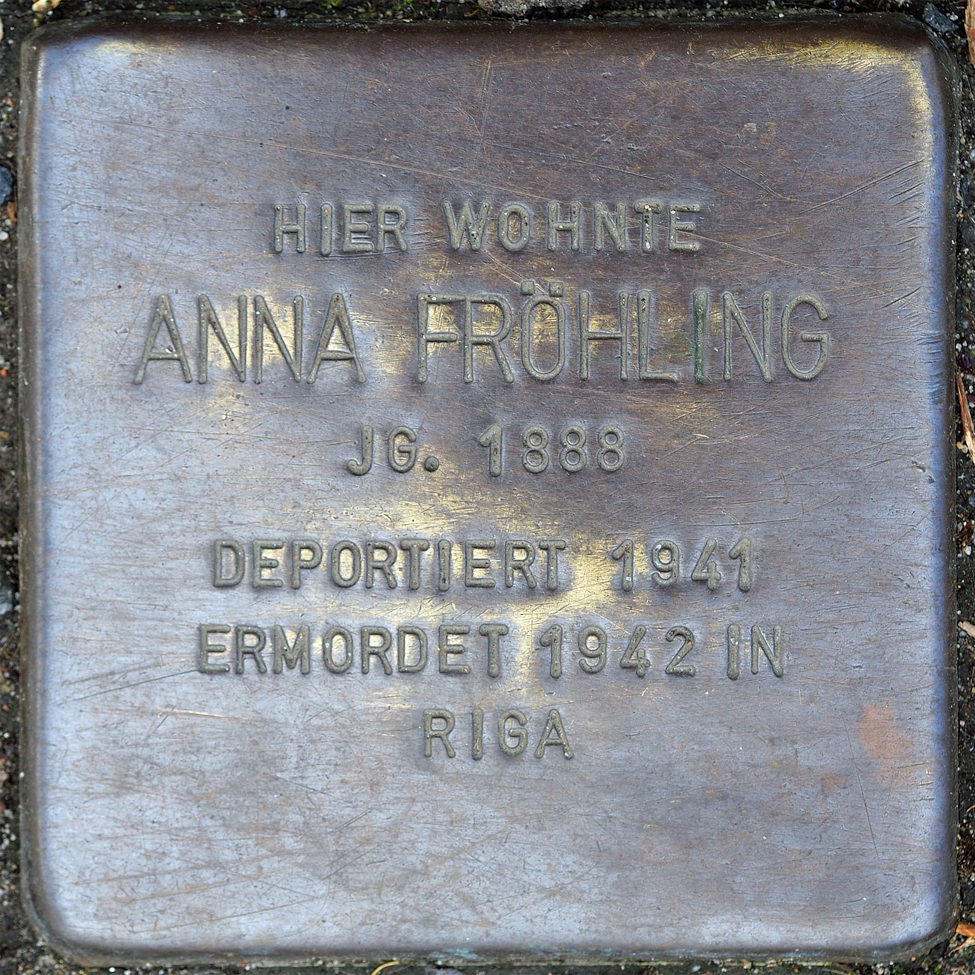 Stolpersteine MG: Fröhling, Anna